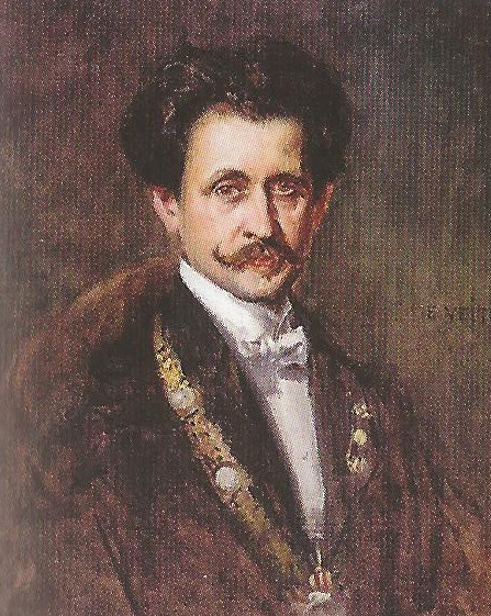 Porträt von Eduard Dolezal (1862–1955), Rektor der Technische Hochschule Wien